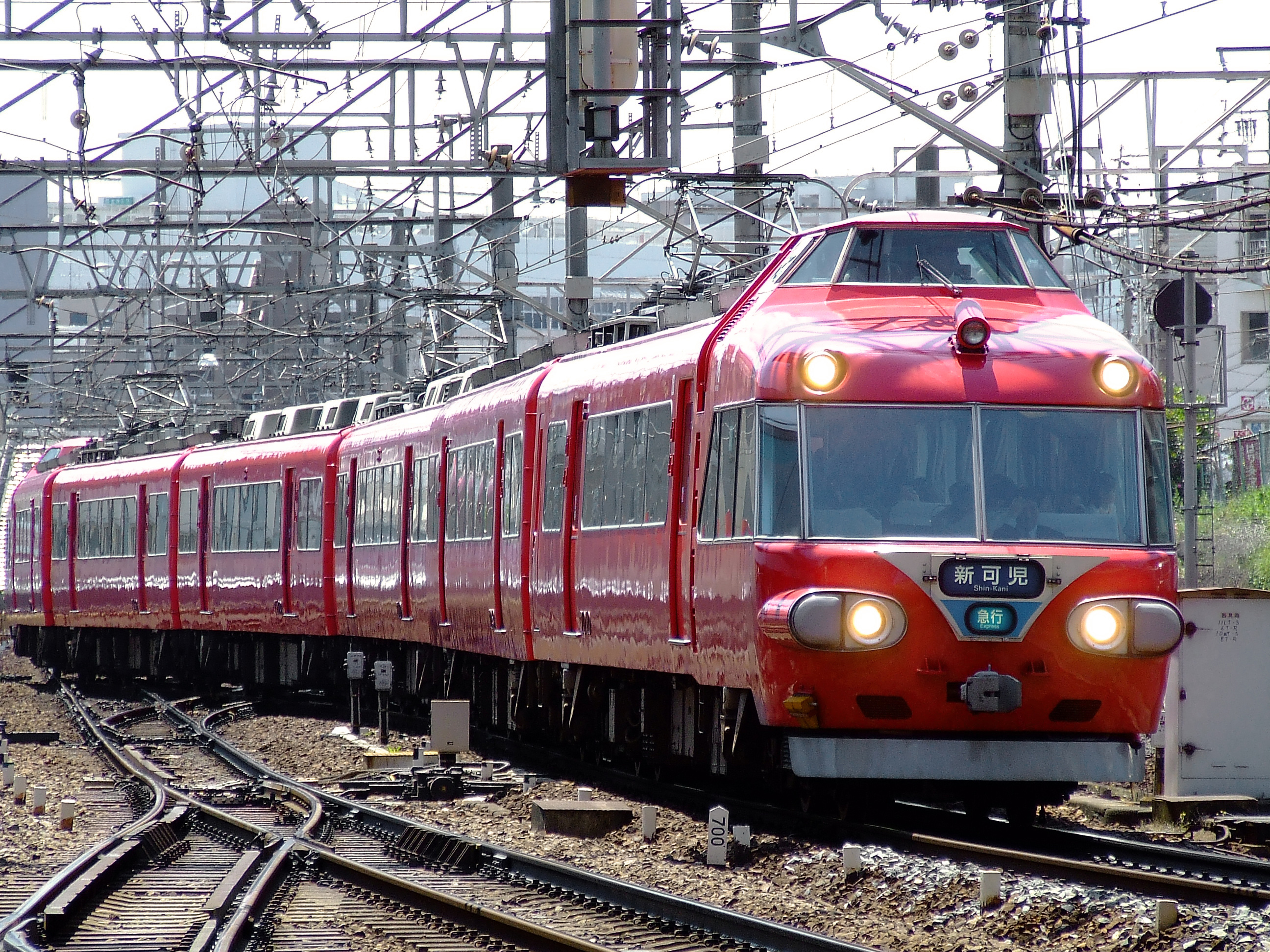 名鉄7000系「パノラマカー」金山にて